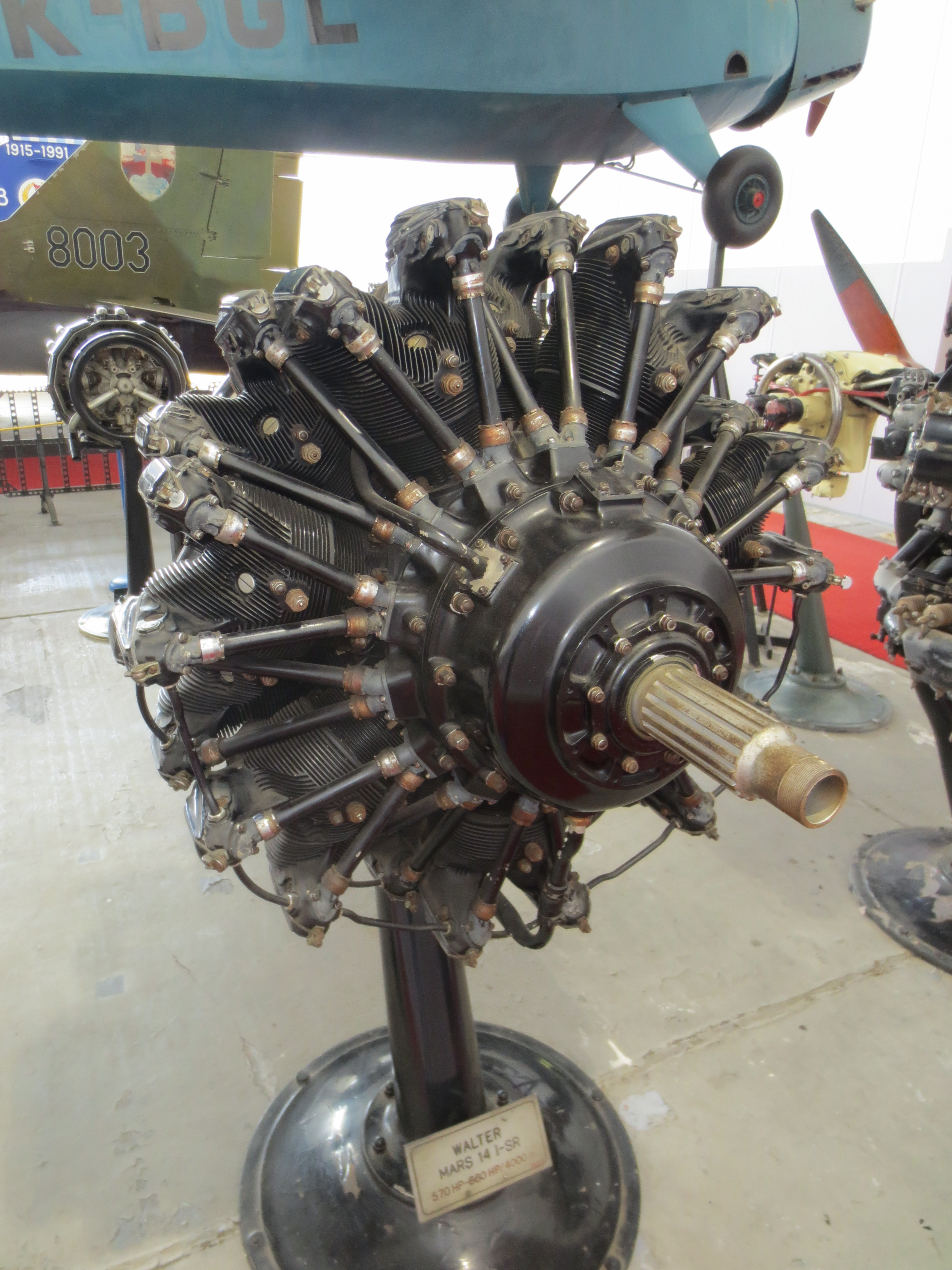 Walter Mars 14M, vzduchem chlazený dvouhvězdicový čtrnáctiválcový letecký motor s kompresorem